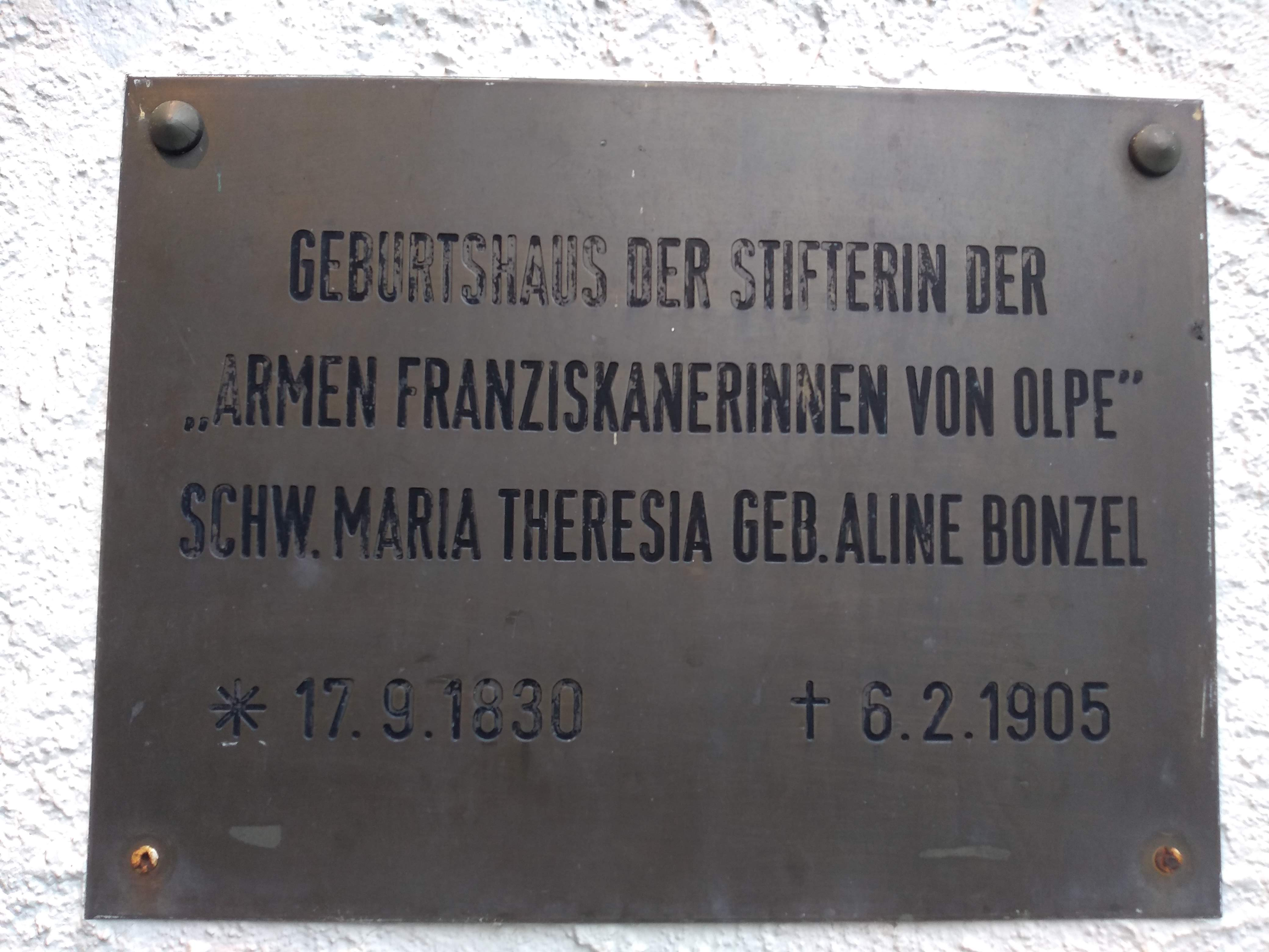 Dieses Schild an einem Haus an der Frankfurter Straße weist darauf hin, dass in diesem Gebäude die selige Maria Theresia Bonzel, Olper Ordensgründerin, geboren wurde.